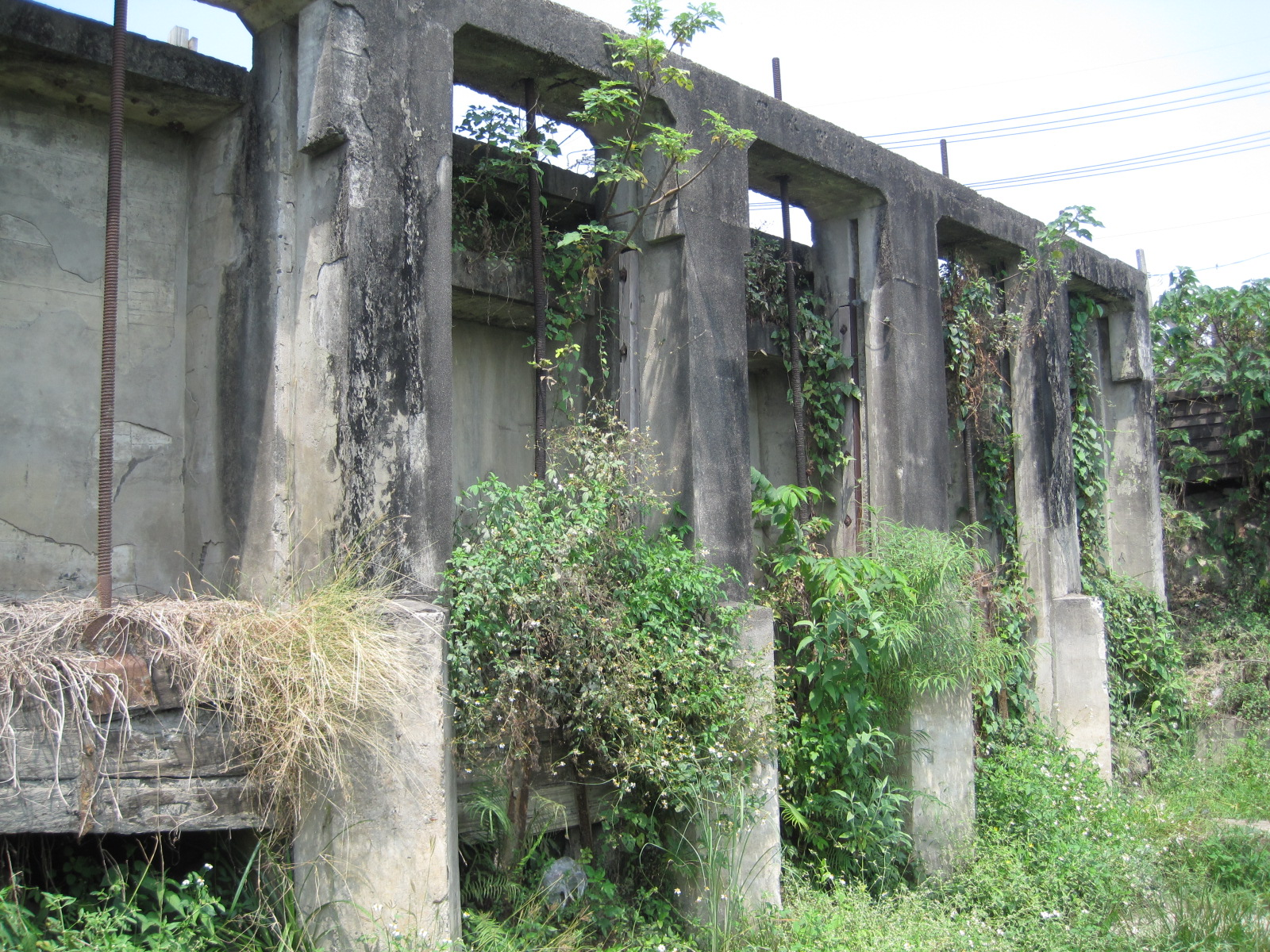 高雄大寮的曹公圳舊圳頭